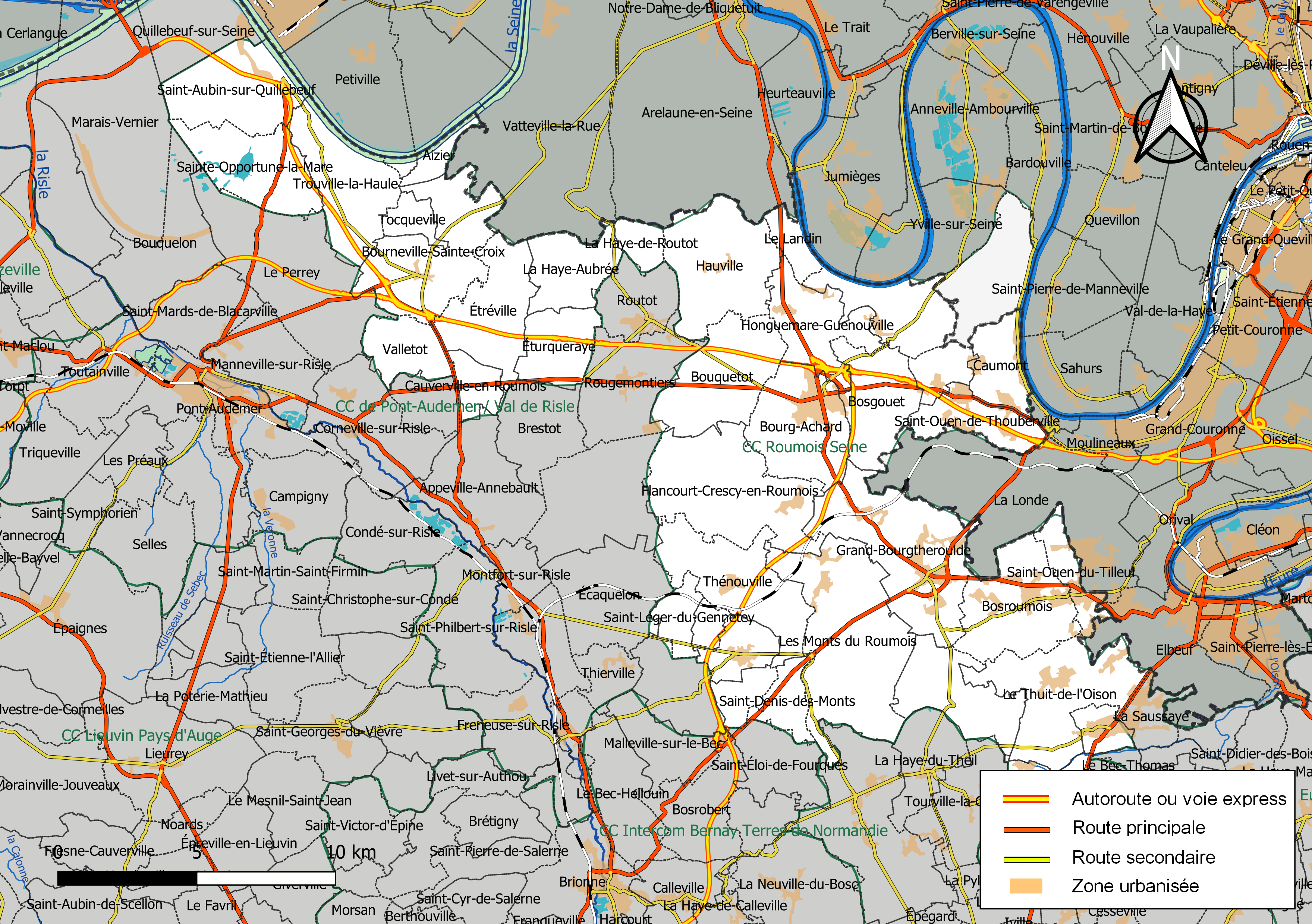 Carte géographique de la Communauté de communes Roumois Seine, département de l'Eure, France. Composition au 1er janvier 2019.